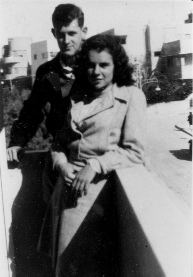 טייסי הפלמ"ח במלחמת השחרור - שמוליק וזוהרה בחופשה בתא - שמוליק וזוהרה בחופשה בת"א. שמוליק וזוהרה